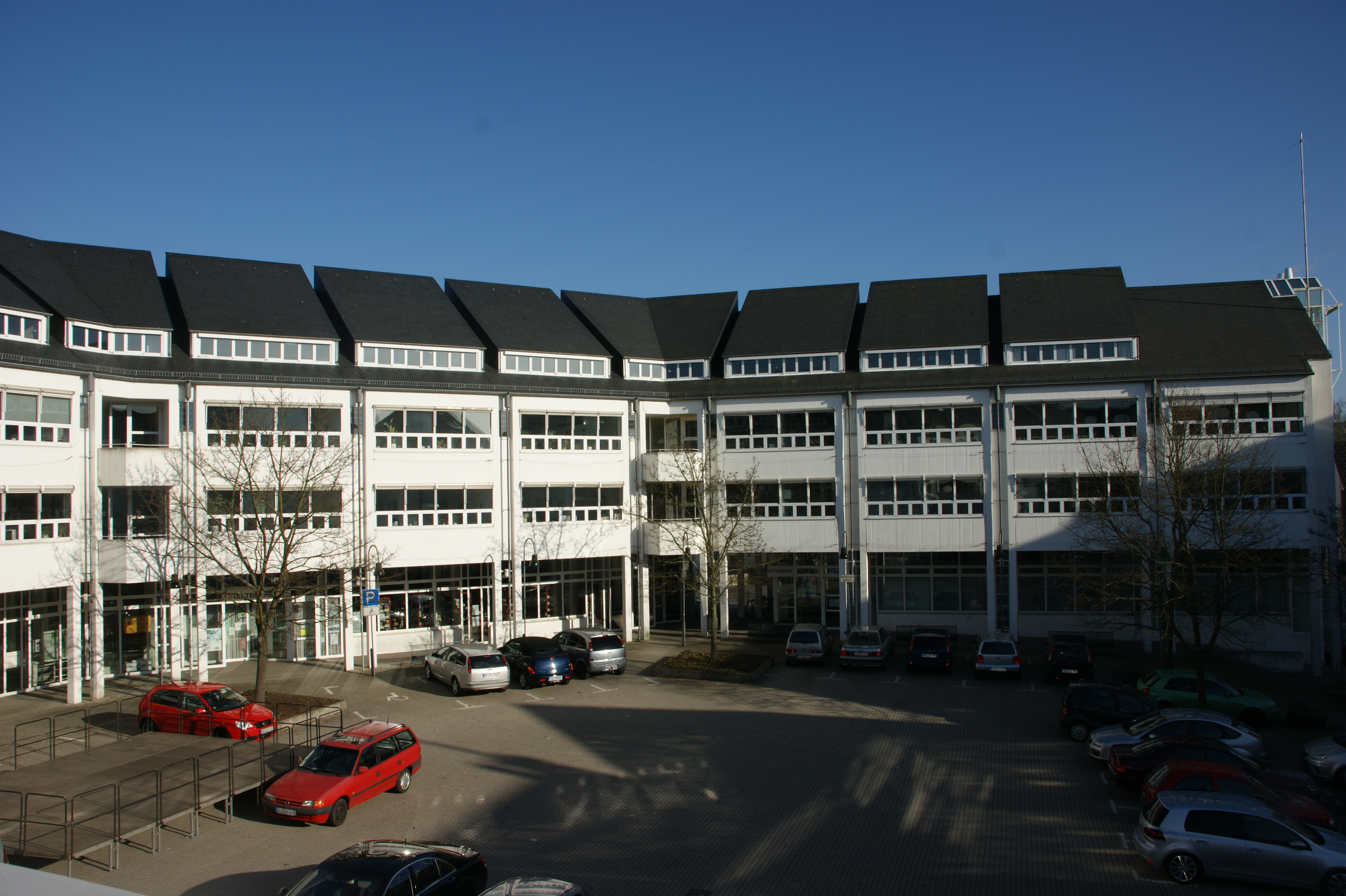 Rathaus von Bad Honnef mit dem Rathausplatz